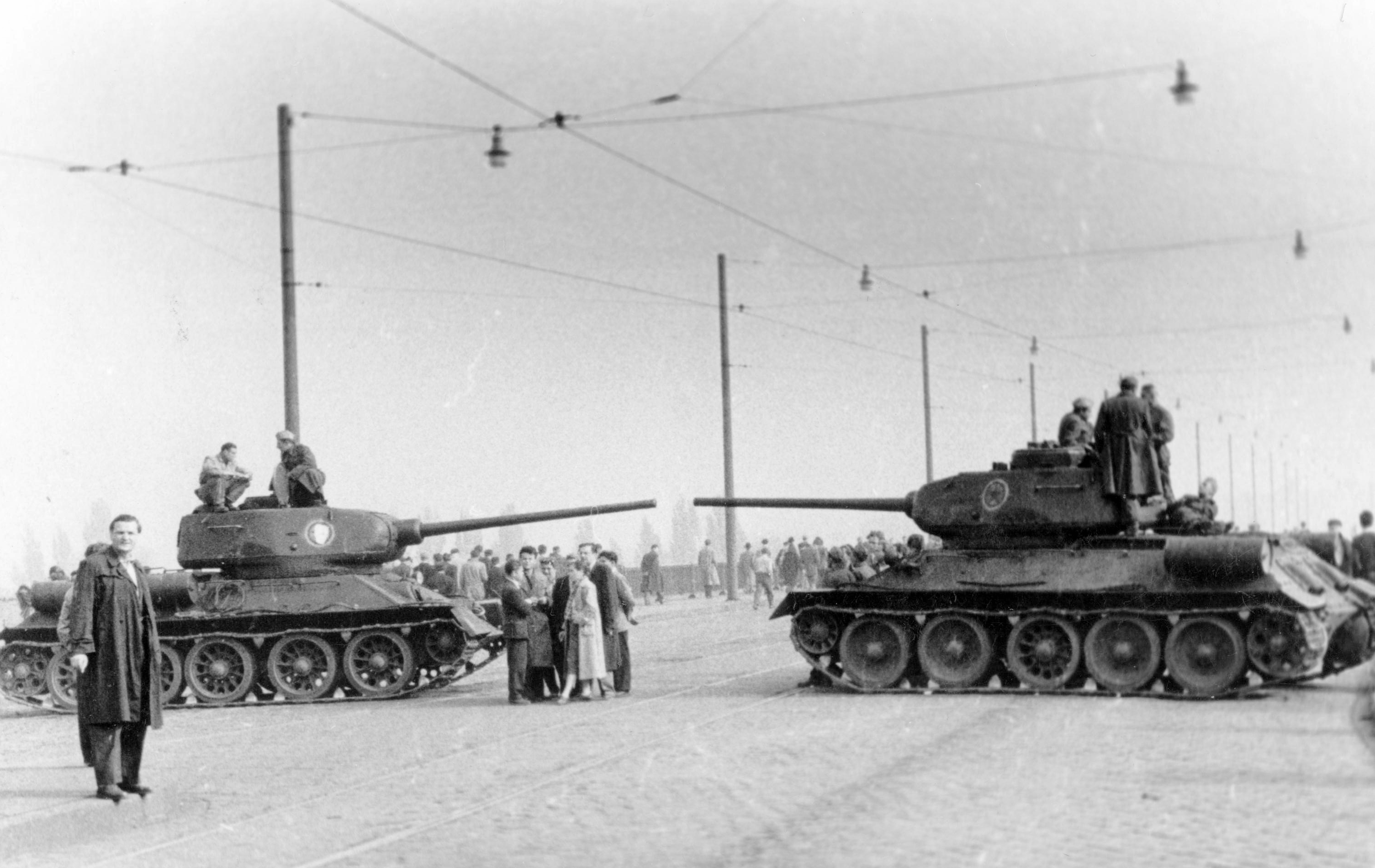 T-34-85 tankok Margit híd. Location: Hungary, Budapest Tags: revolution, pedestrian, sunshine, soldier, tank, Soviet brand, genre painting Title: Margit híd.